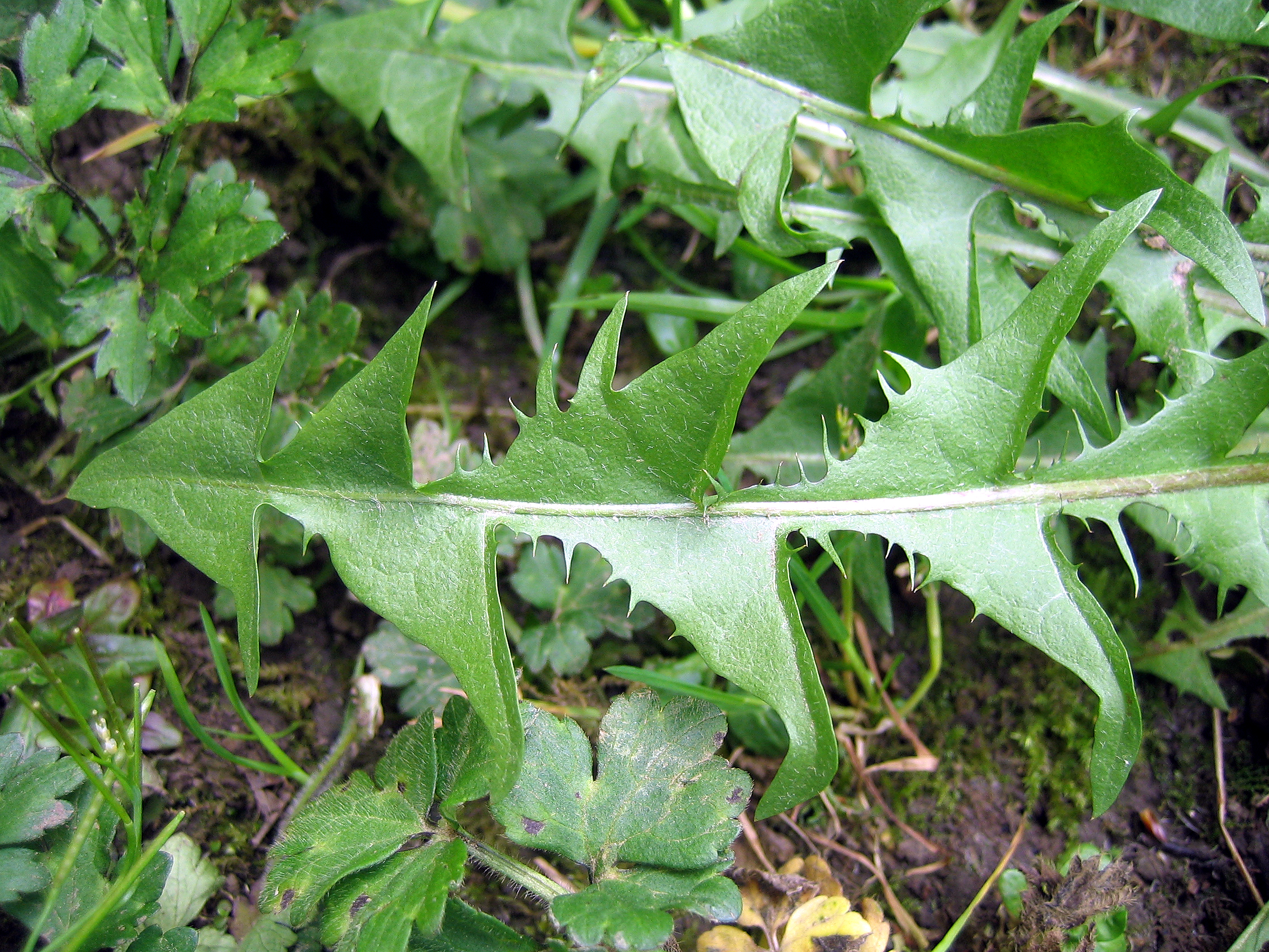 Feuille de pissenlit, très verdoyante, pleine de sève (photo prise au printemps), montrant bien sa dentelure. Vue prise au fond d'un jardin de la région amiénoise (Picardie, France).